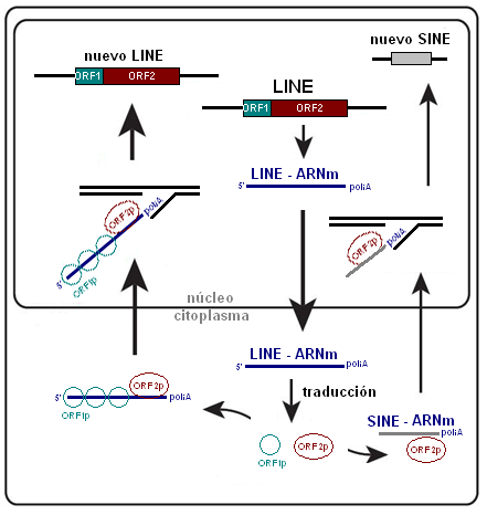 Esquema simplificado de la retrotransposición de un elemento LINE y de un elemento SINE. Creación propia, para su publicación en el artículo Genoma Humano (castellano), donde se incluye una breve explicación.